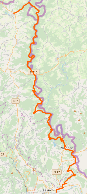 Streck vum Our-Pad